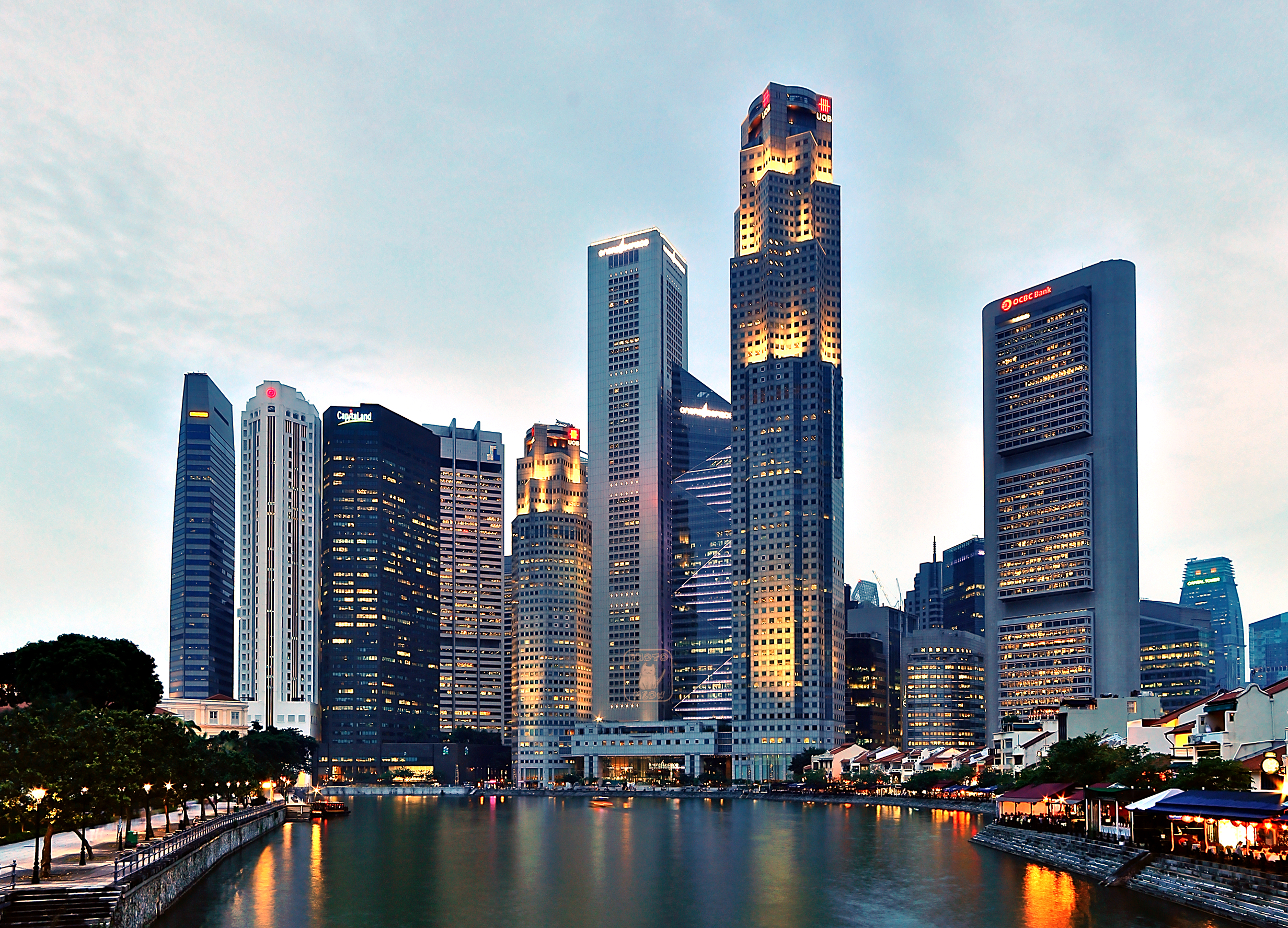 Singapore skyline from Elgin bridge